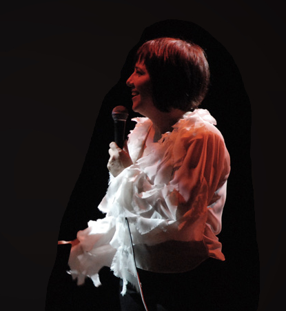 Laura Canoura